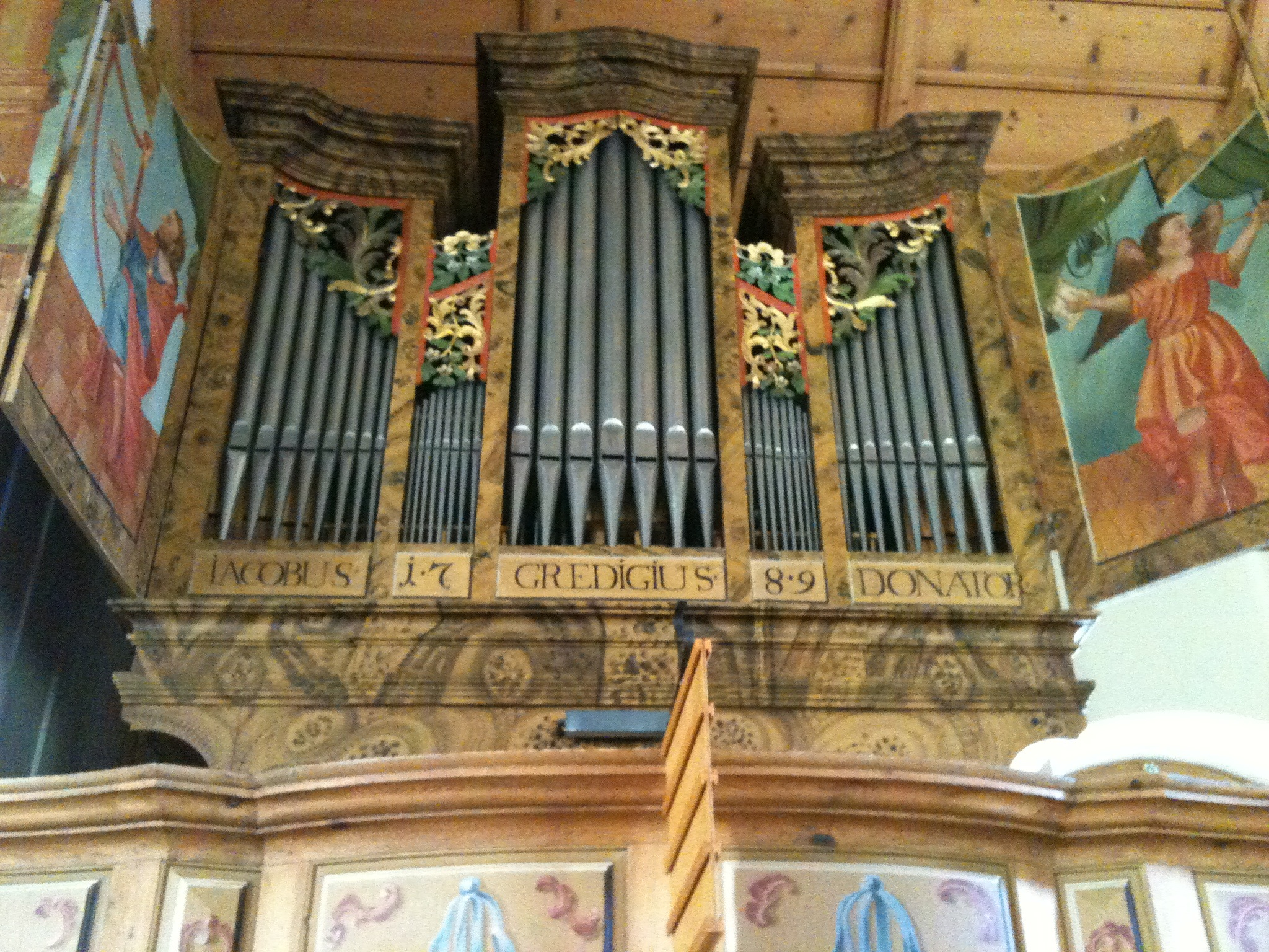 Orgel in der reformierten Kirche Versam, Kanton Graubünden